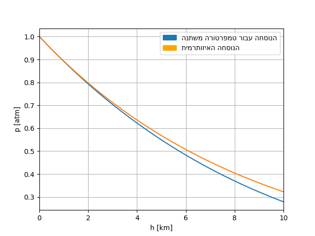 השוואה בין הנוסחאות הברומטריות